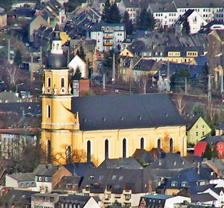 St Paulin Kierch zu Tréier